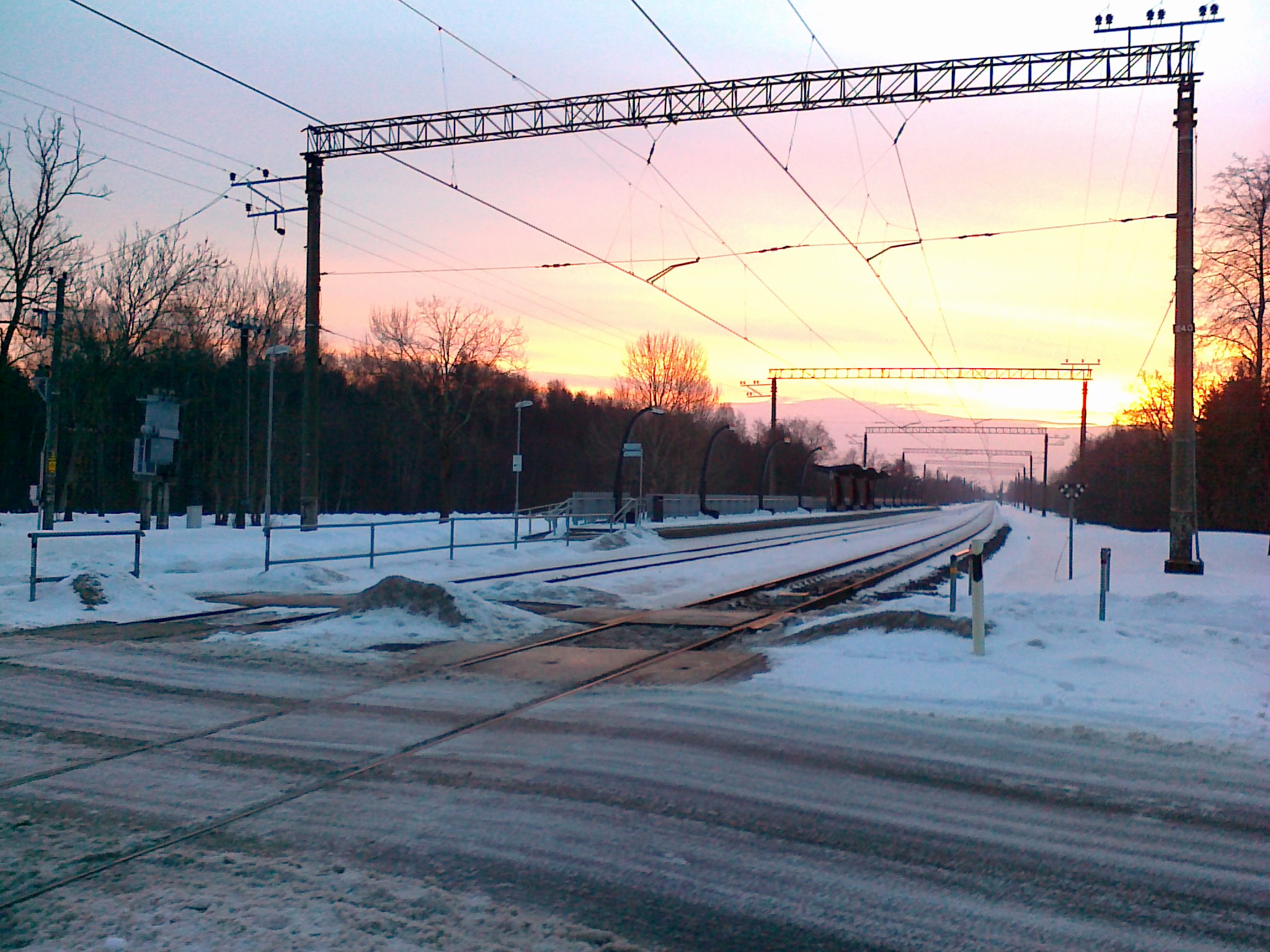 Aruküla raudteepeatus, vaade ülesõidukohalt Tartu suunas.